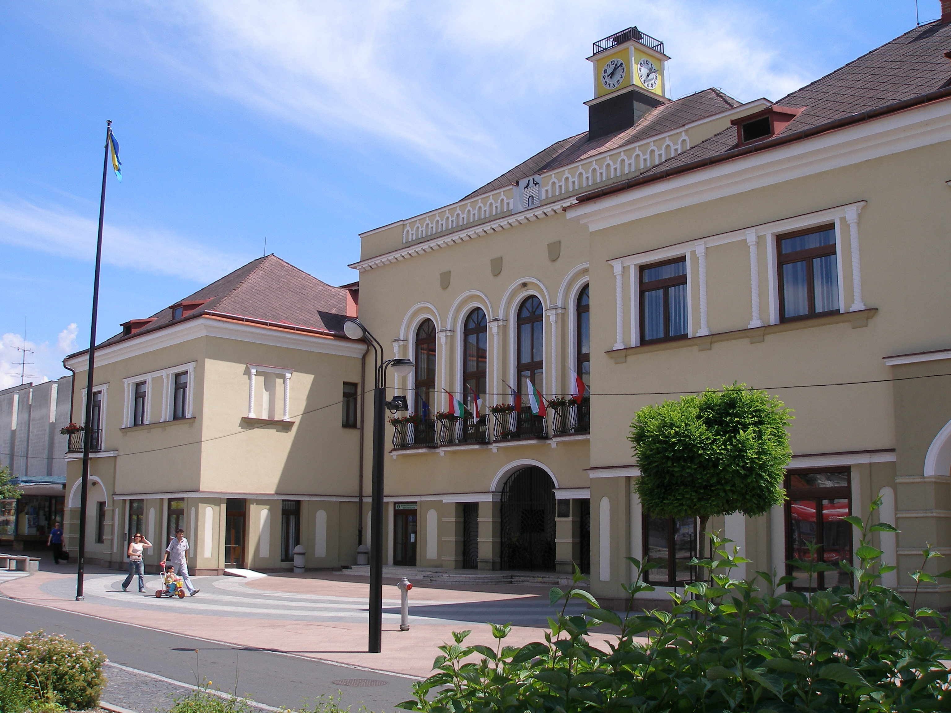 Michalovce, okresné mesto, región Zemplín